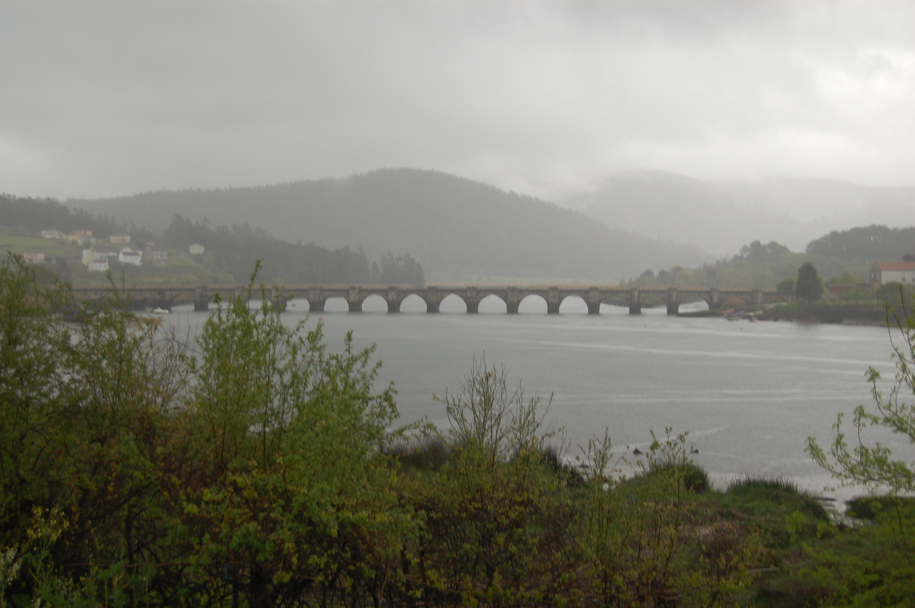 Ponte Nafonso, sobre o río Tambre, entre os concellos de Noia e Outes.